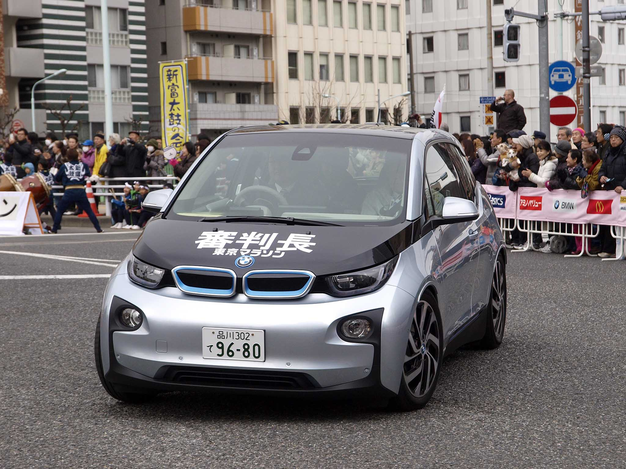 2014年の東京マラソンでフルマラソンの審判長車および車椅子の先導車を務めたBMW i3。同年の日本人男子最高位選手に副賞として贈呈されている。 登録番号：品川302て9680 撮影地：東京都中央区、入船橋交差点